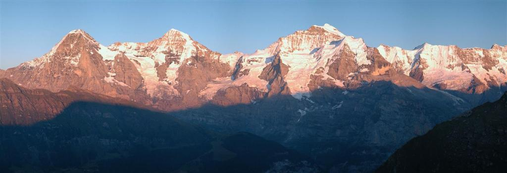 Eigeris, Monchas, Jungfrau. Šveicarijos Alpės. Berno kantonas.